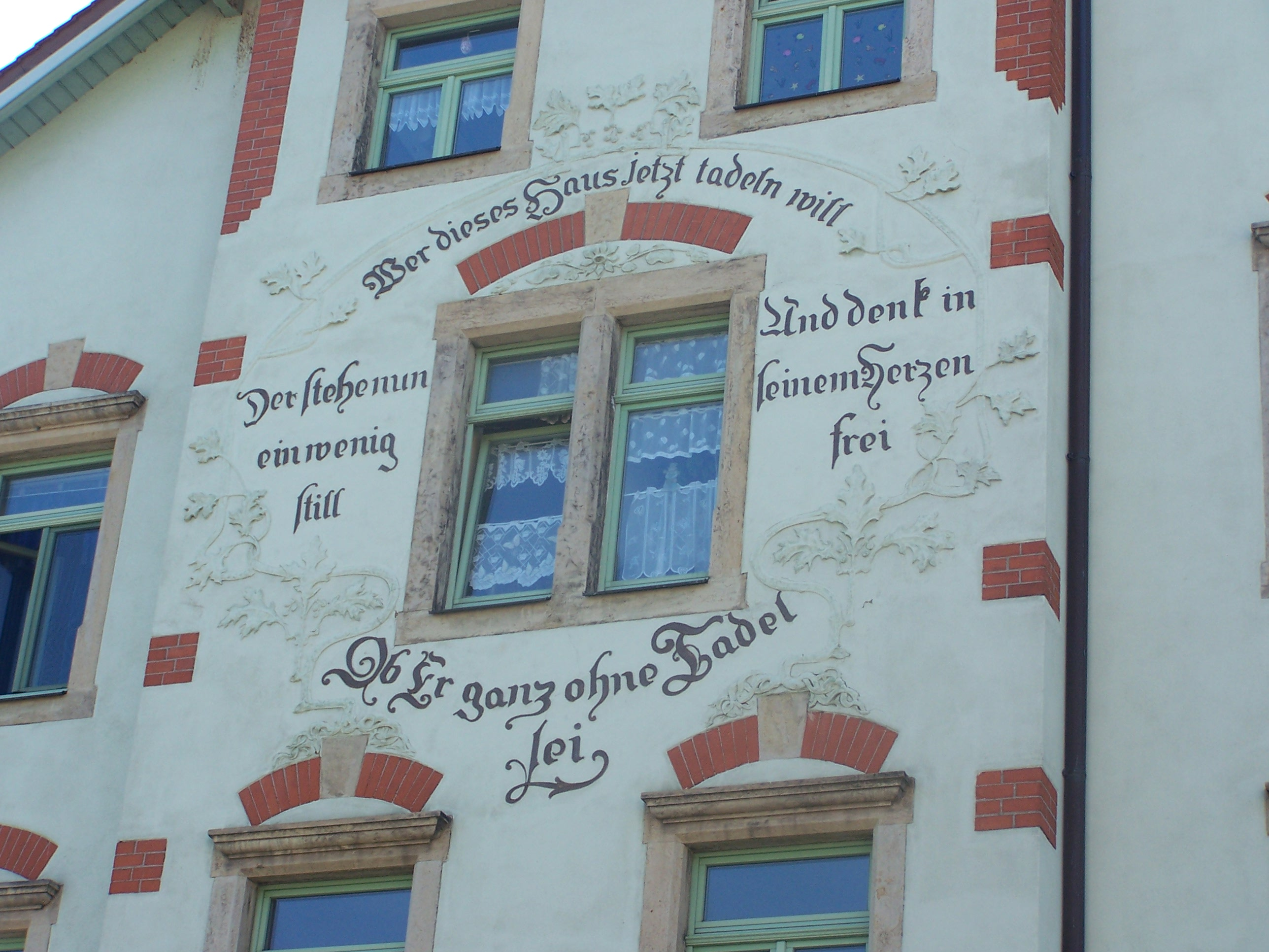 Detailansicht Friedrich-August-Haus in Dresden-Neukaditz (an der Leipziger Straße), erstes Haus des Dresdner Spar- und Bauvereins "Wer dieses Haus jetzt tadeln will, Der stehe nun ein wenig still, Und denk in seinem Herzen frei, Ob Er ganz ohne Tadel sei". Siehe auch: Image:Dresden FriedrichAugustHaus1.jpg